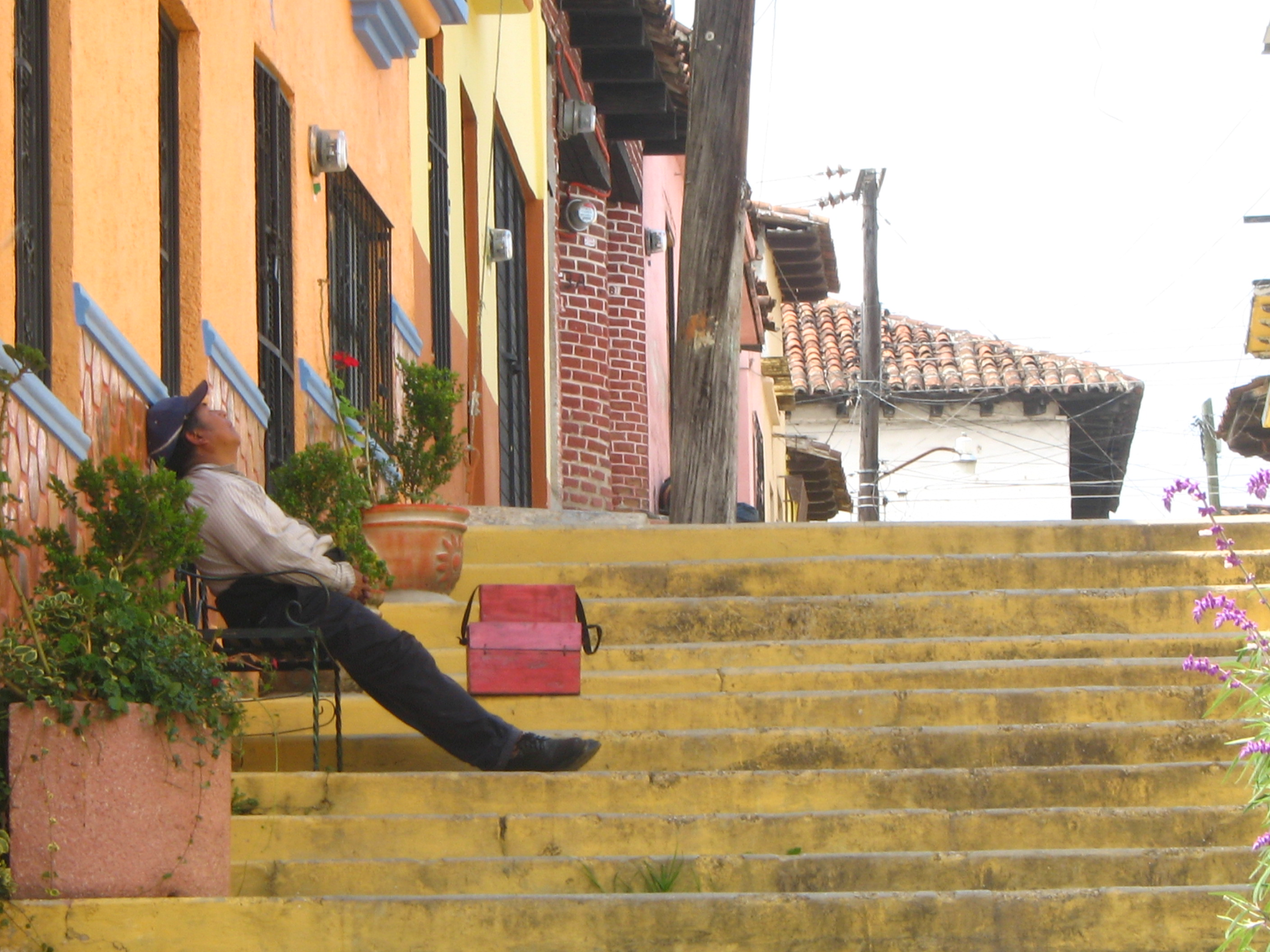 San Cristobal de las Casas, Chiapas, Mexico